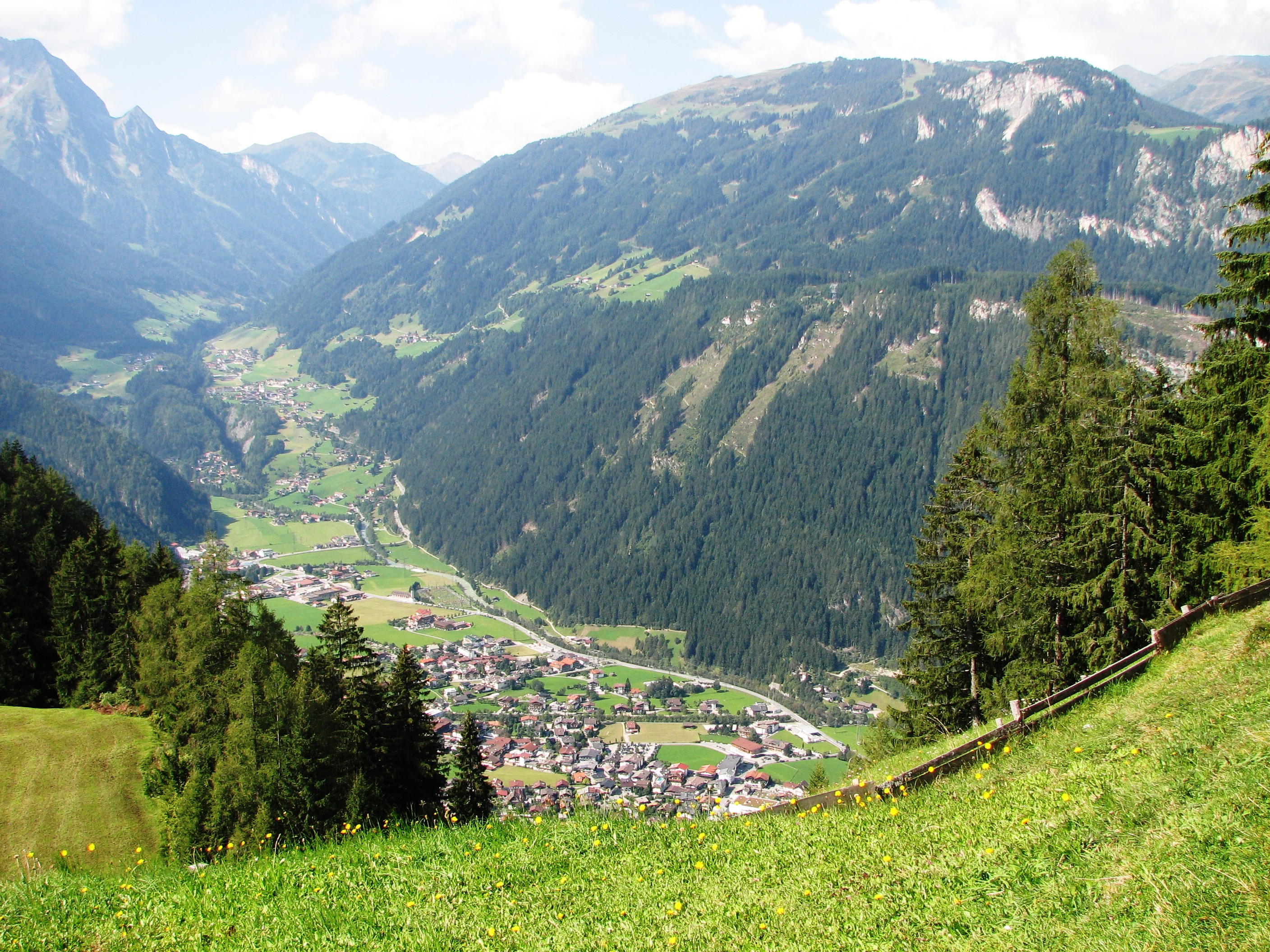 Zillertaler Berglandschaft.